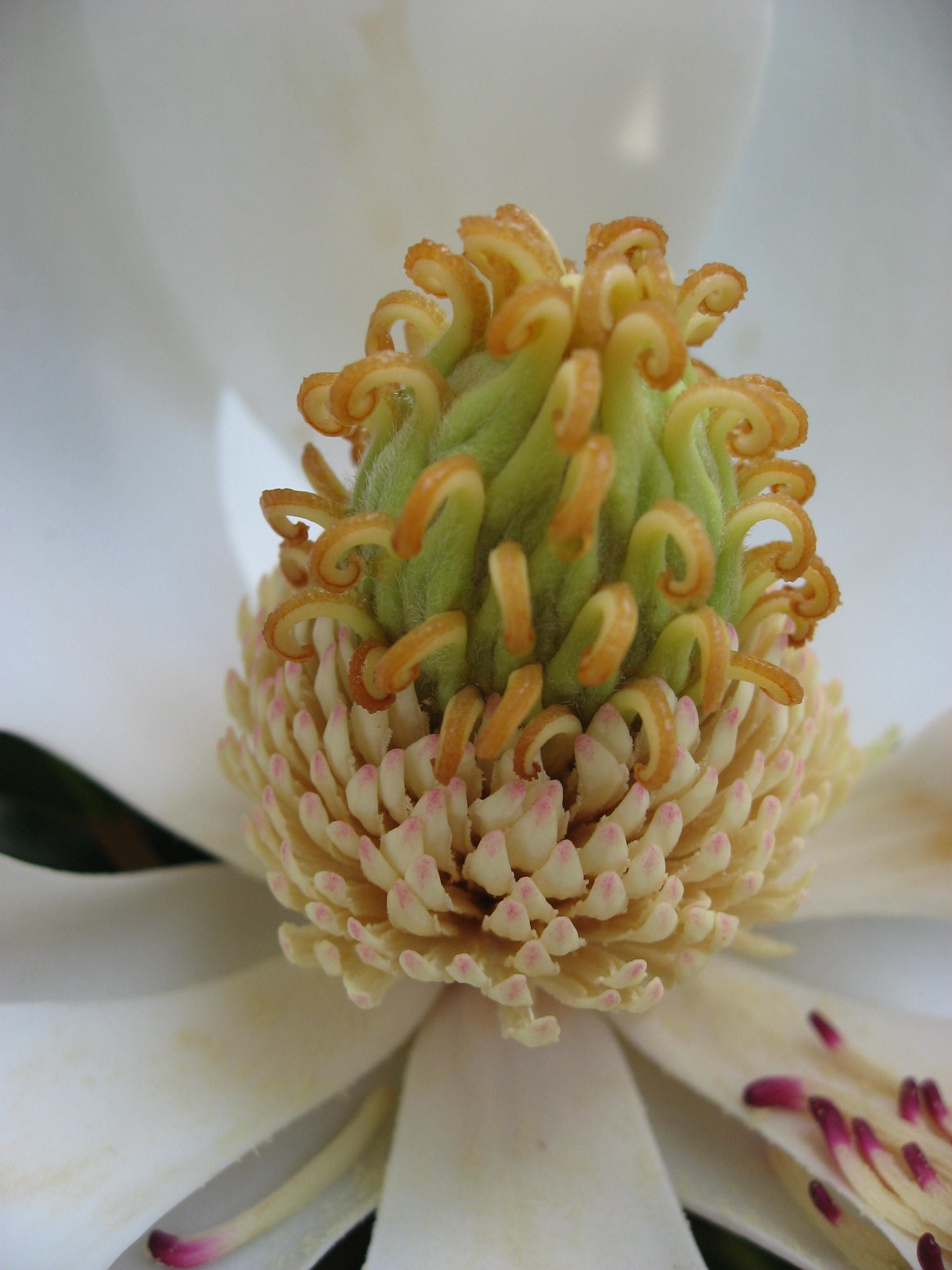 Magnolia grandiflora flower in Giardino dei Semplici di Firenze Map: 43° 46' 45" N 11° 15' 39" E